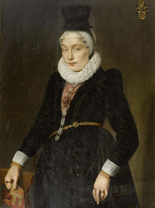 Portrait der Katharina von Mülinen (1597 -1620), vermählt mit Hans Rudolf Willading am 24. Mai 1617.